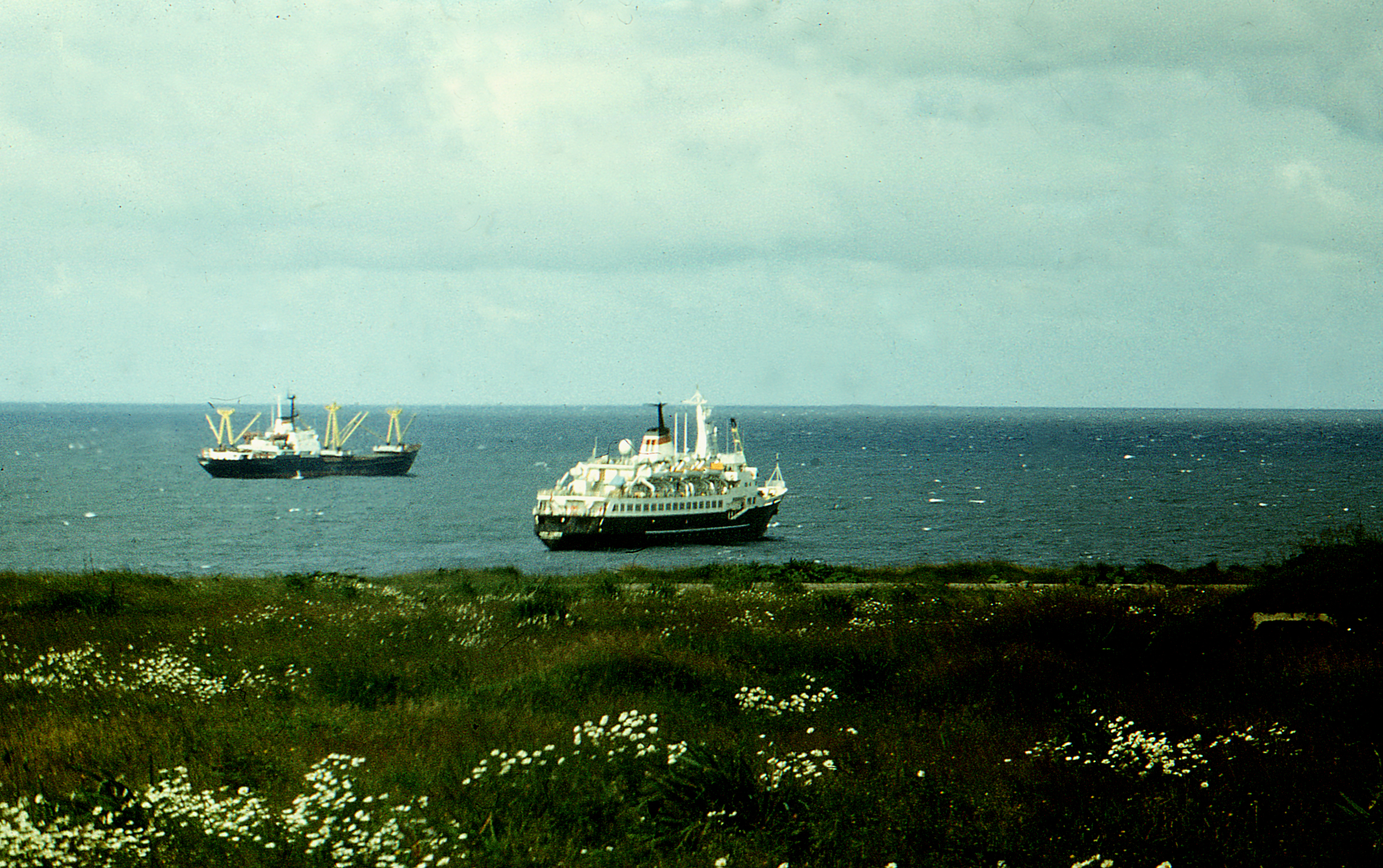 Рейд города Курильска.Остров Итуруп.